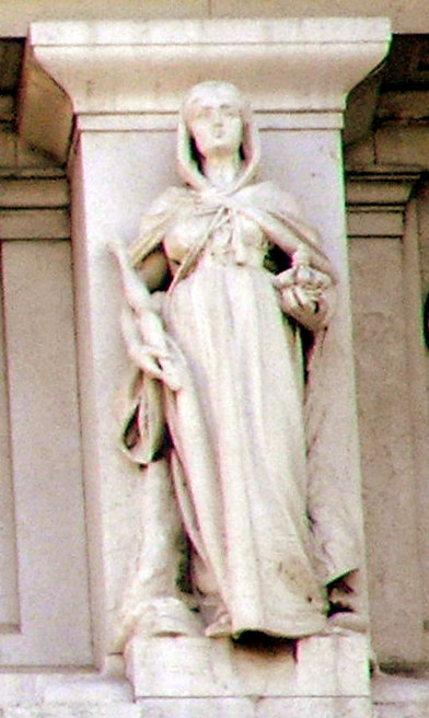 Vittoriano - statue delle regioni - Sardegna